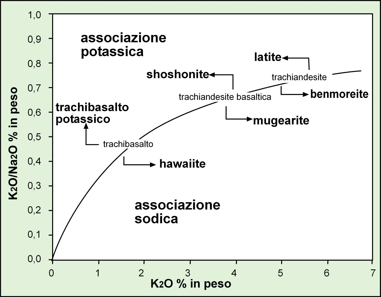 La linea di demarcazione tra associazione potassica e associazione sodica nel diagramma K2O verso K2O/Na2O nelle rocce calcoalcaline